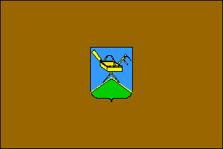 Zierbenako bandera, Bizkaian